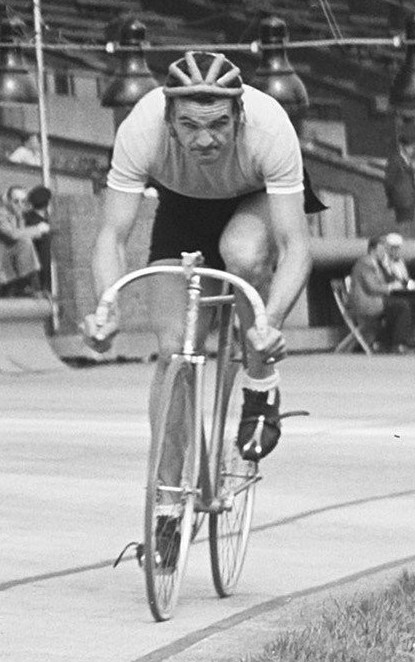 Wereldkampioenschap Stadion. Boven opening Uruguay de Armas